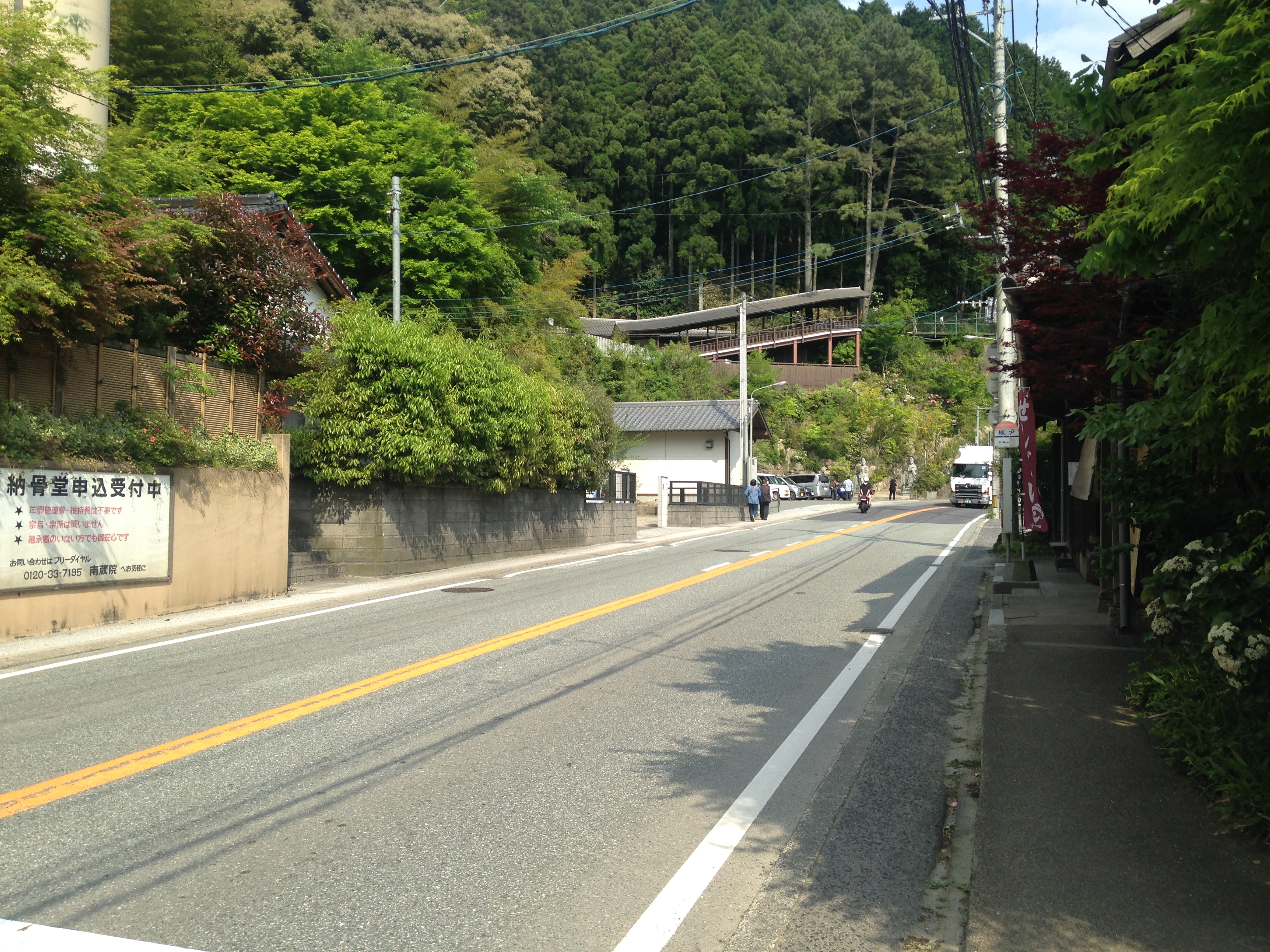 南蔵院付近を通る国道201号(飯塚方面)